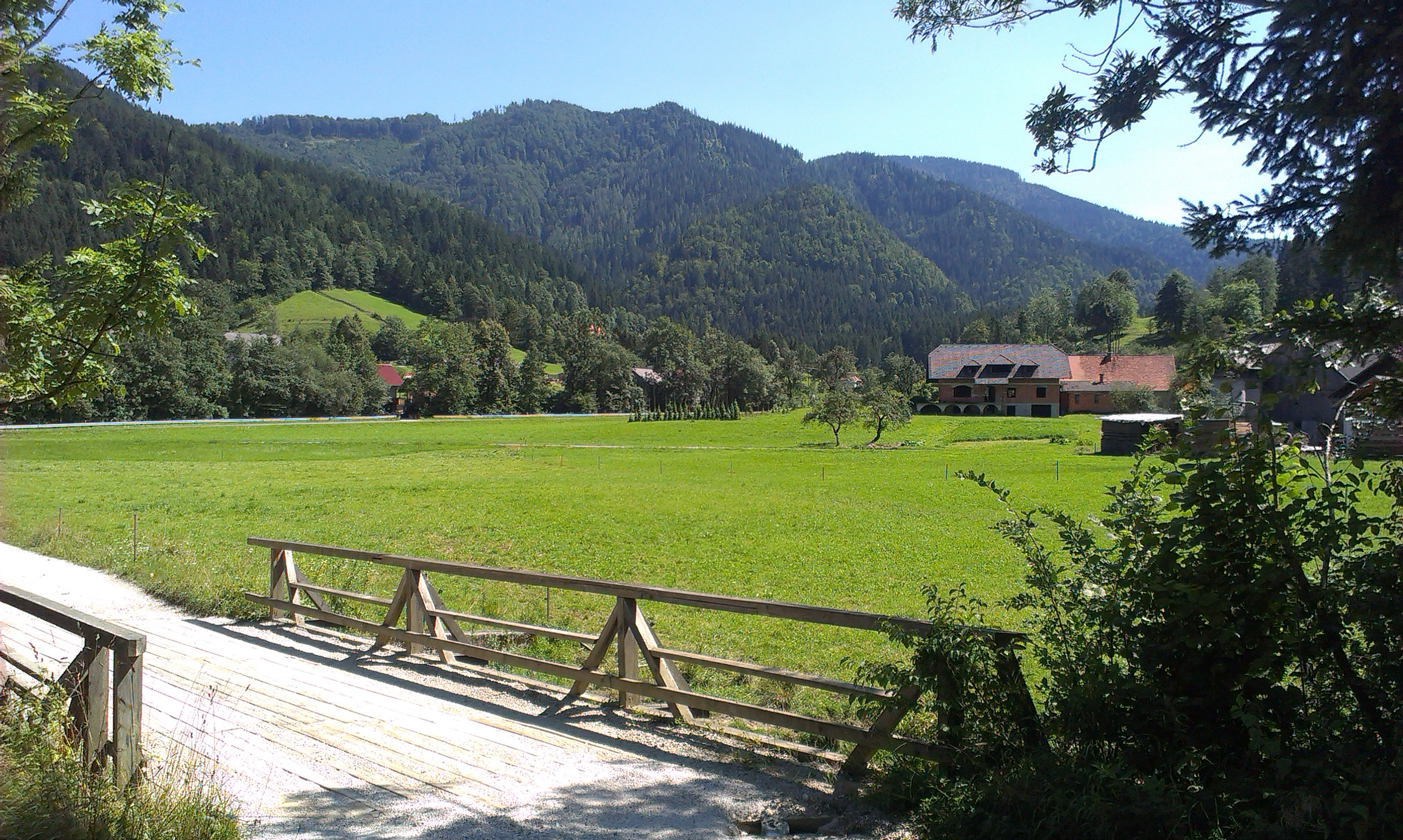 Pogled na del Podvolovjeka.